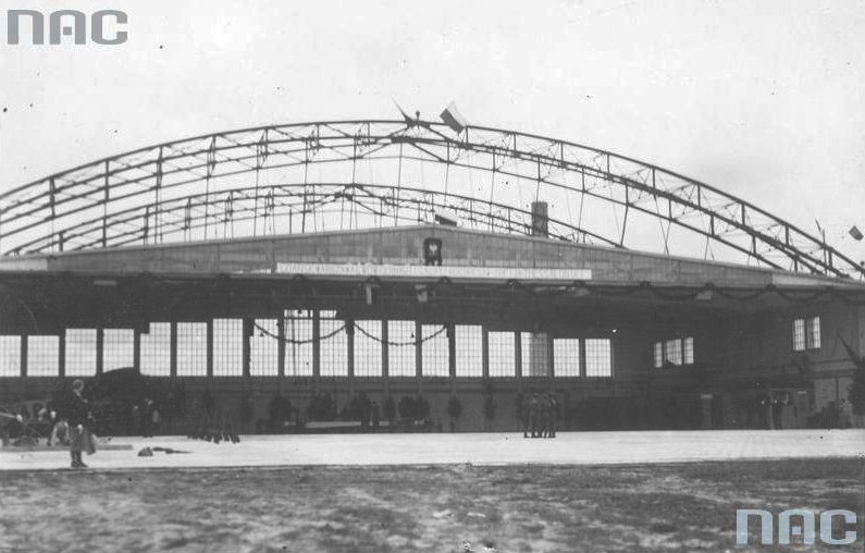 Ангар-аеровокзал Львівського аеропорту.JPG: довоєнний ангар-аеровокзал Львівського аеропорту